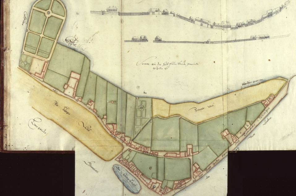 Abbildung der Bürgerwiese aus: Hans August Nienborg: Kartierung der Dresdner Vorstädte. kolorierte Handzeichnung, 1706.